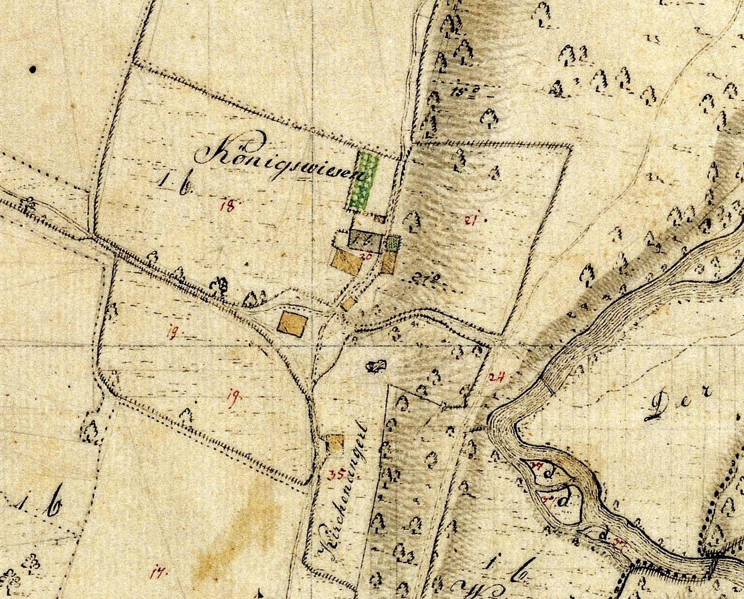 Lage des ehemaligen Gutes Königswiesen auf einer Flurkarte von 1809